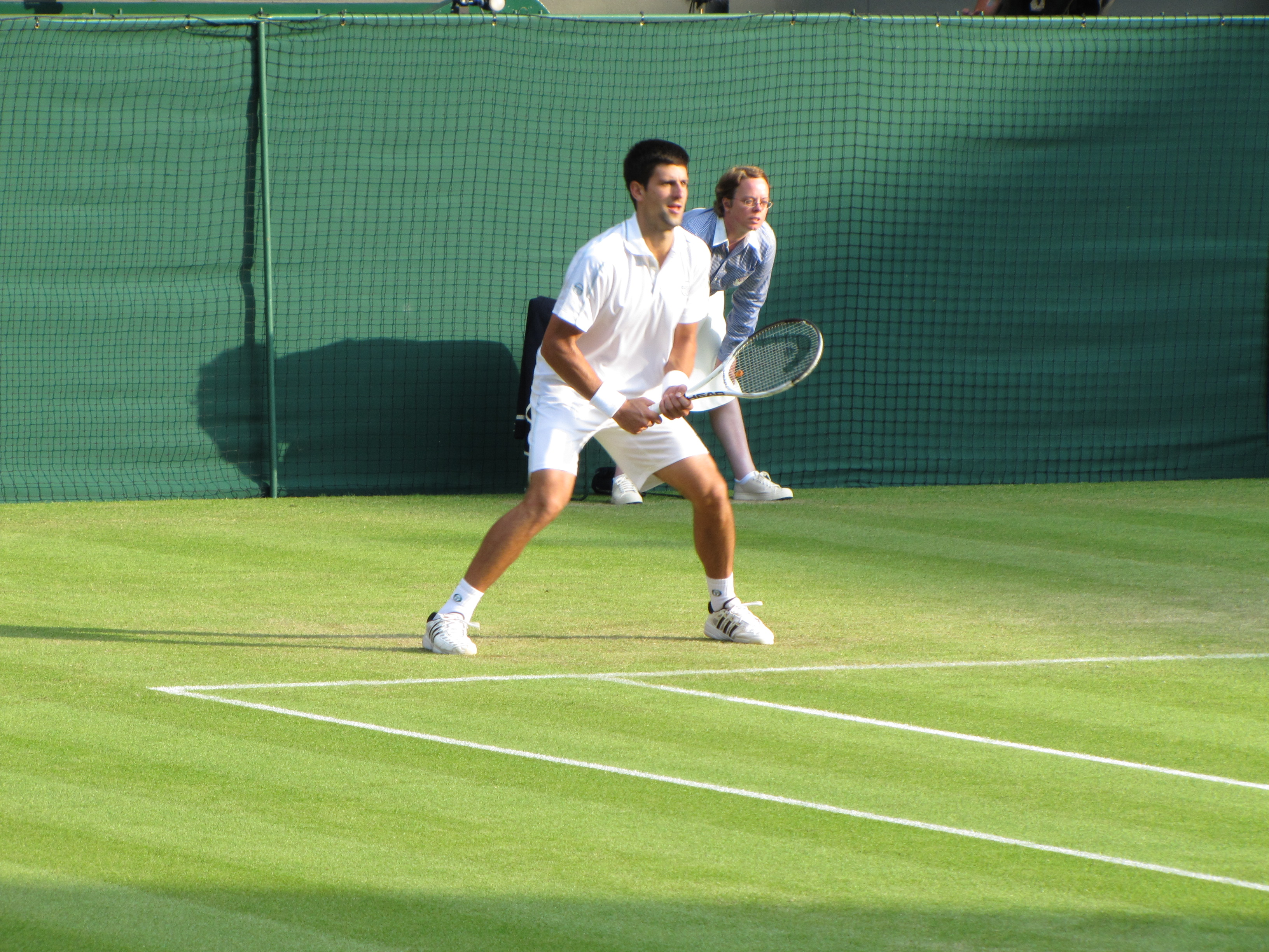 Novak Đoković, 2010 Wimbledon Championships